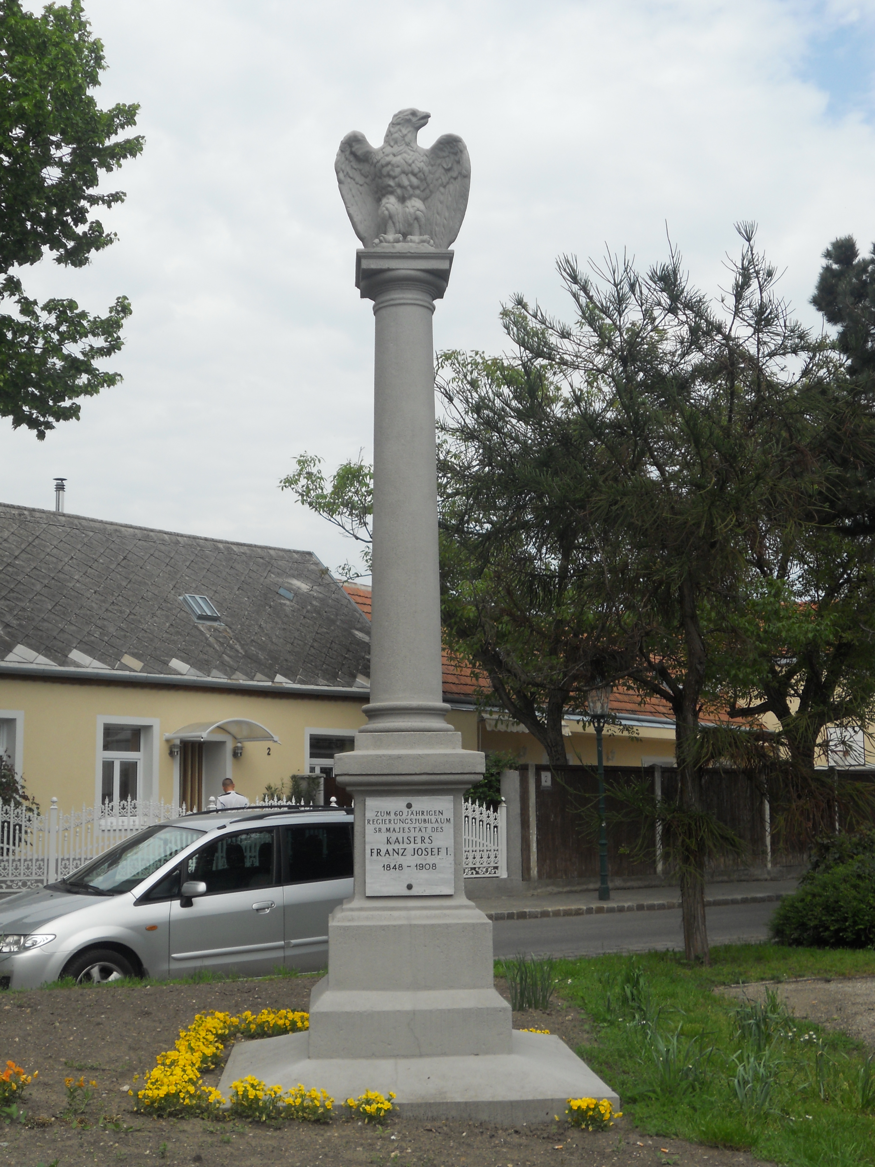 Kaiser Franz Joseph - Jubiläumssäule auf dem Freiheitspaltz in Stammersdorf